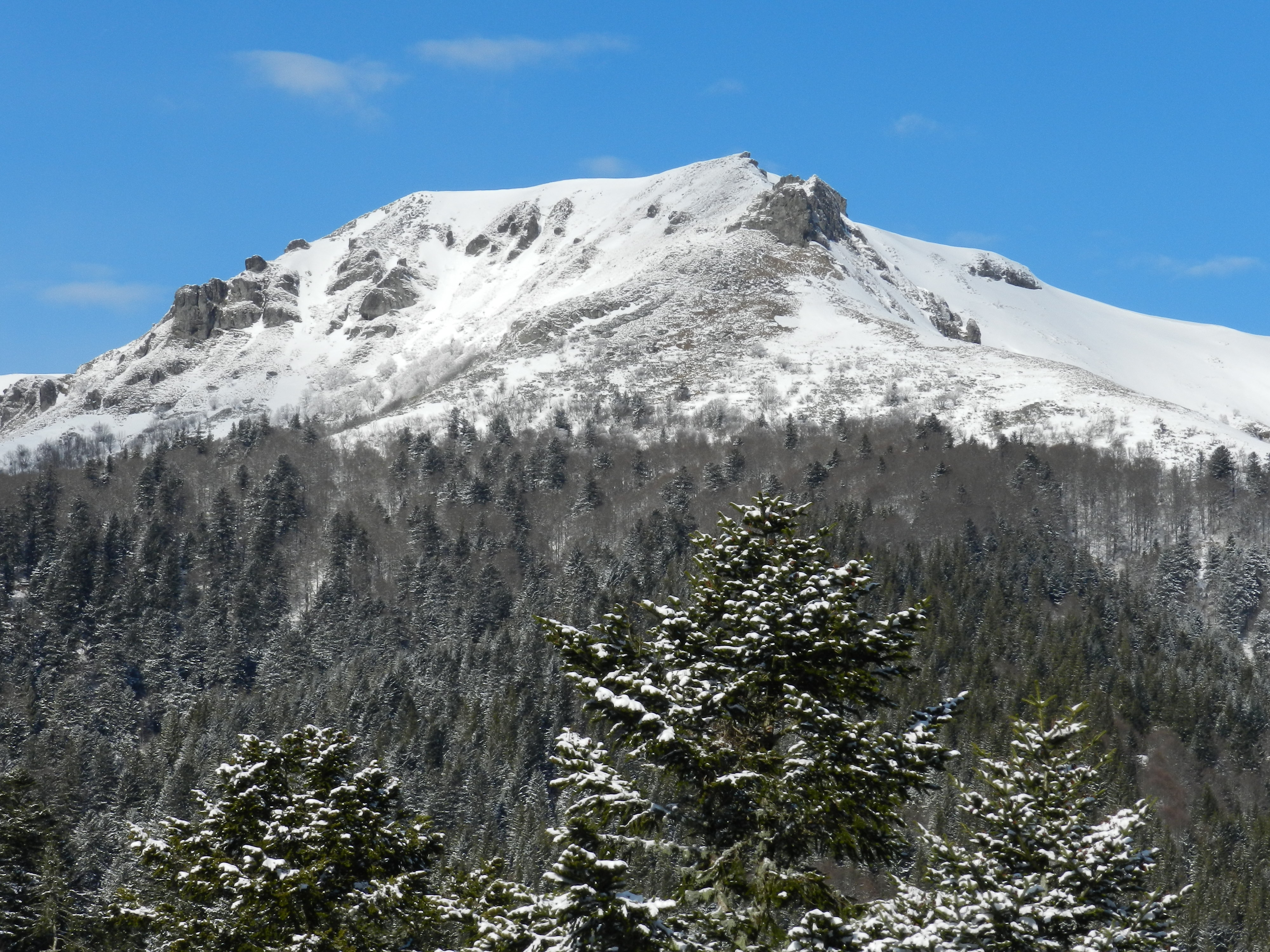 Le Bec de l'Aigle enneigé